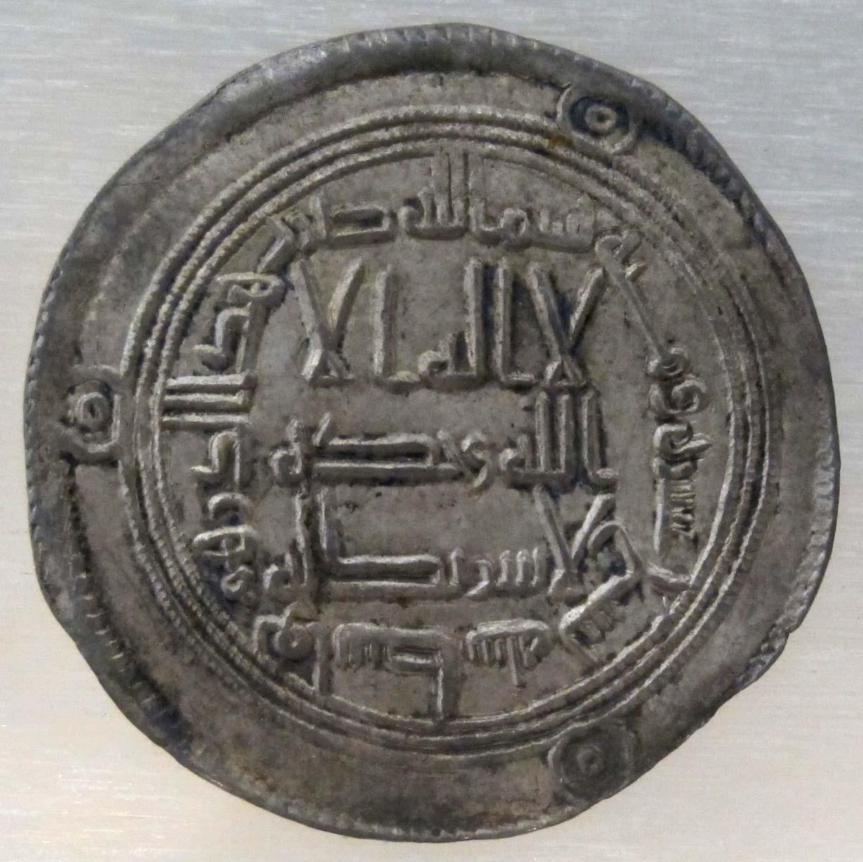 Siria (damasco), califfo hisham, dirhem omayyade, 724-743